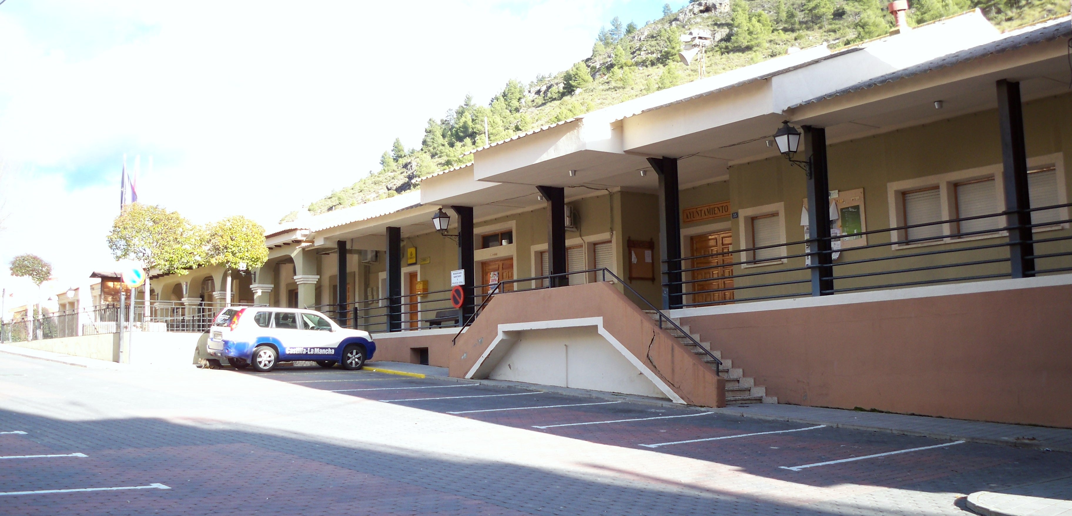 Fotografía del Ayuntamiento de Molinicos (Albacete)